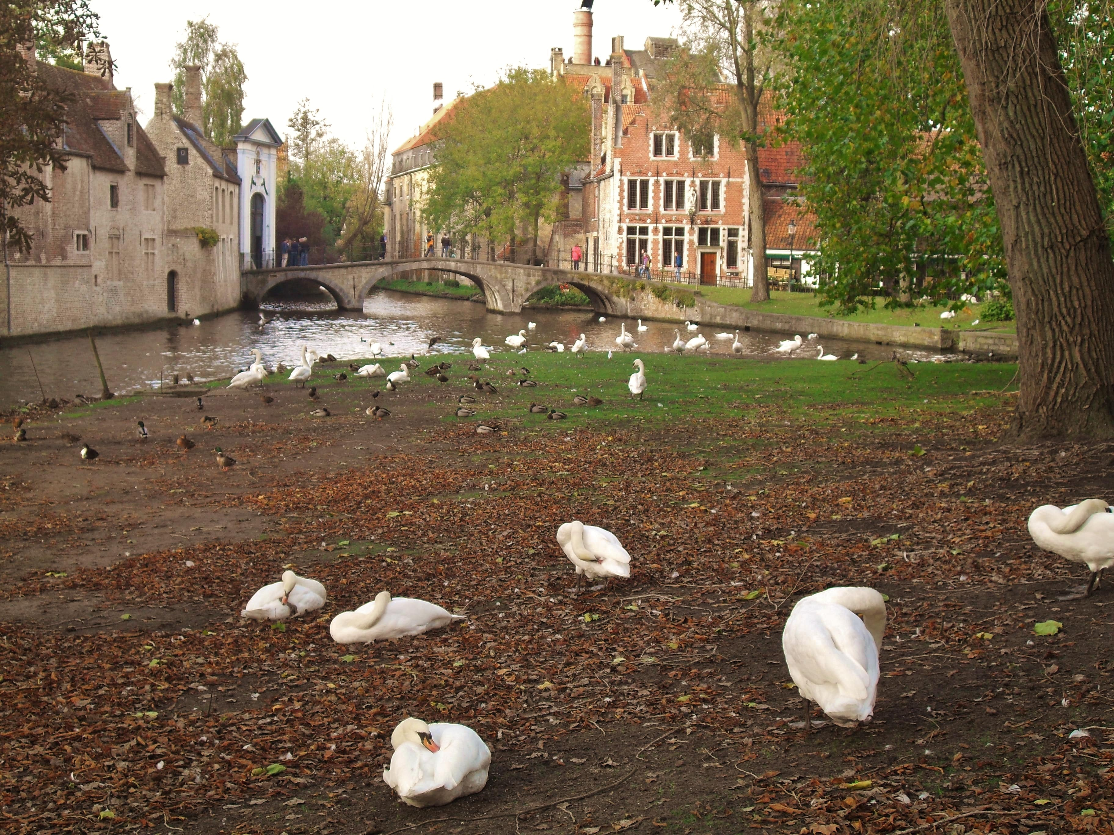 Eine Brügger Legende behauptet, dass Maximilian von Habsburg die Stadt Brügge nach seiner Freilassung dazu verurteilte auf ewig Schwäne sogenannte „Langhälse“, auf dem Minnewater zu halten. Noch heute sind diese dort zahlreich vertreten.